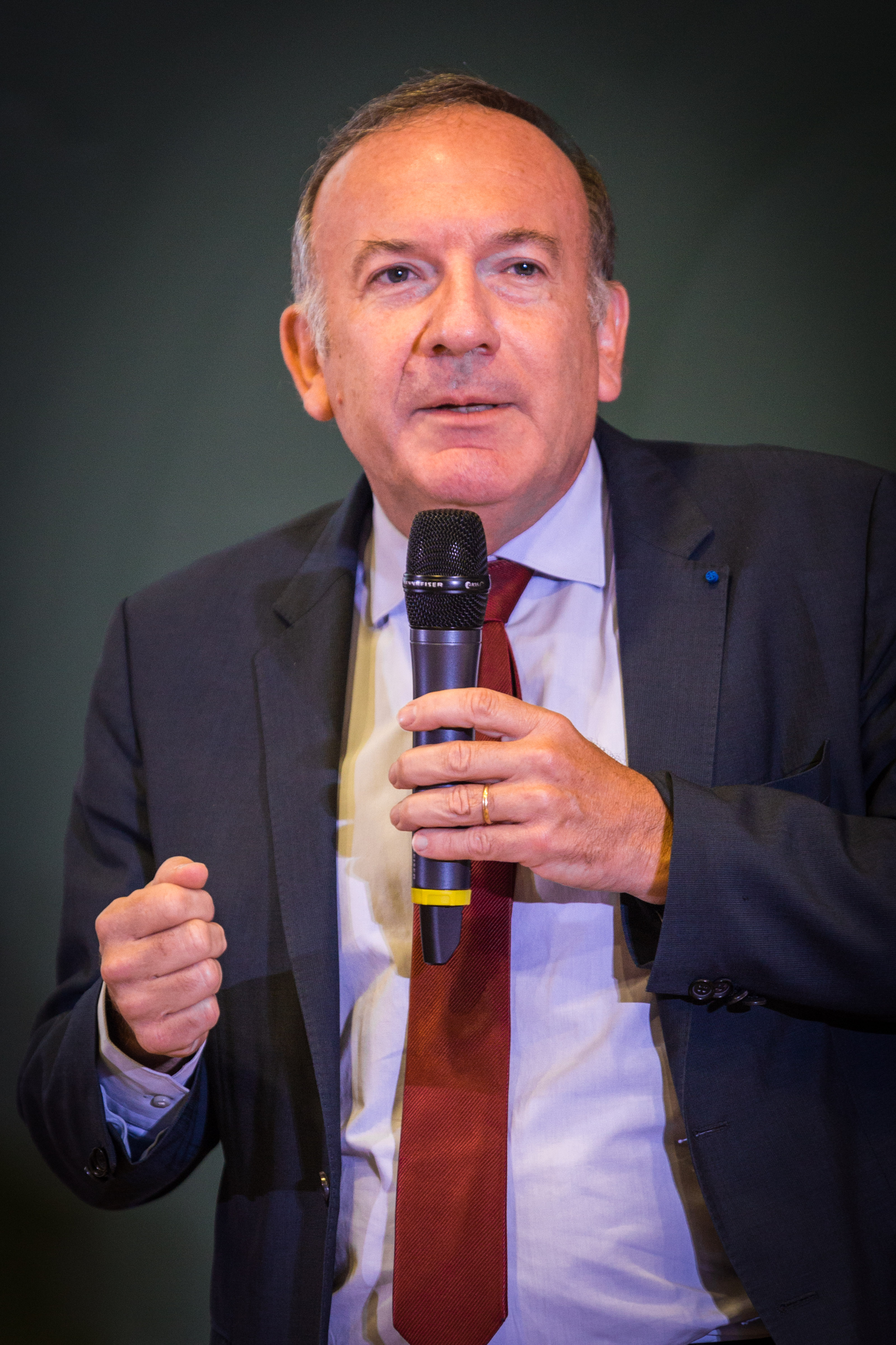 Pierre Gattaz à l’université d'été du MEDEF Alsace, Strasbourg 3 septembre 2015